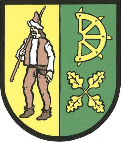 Košík znak